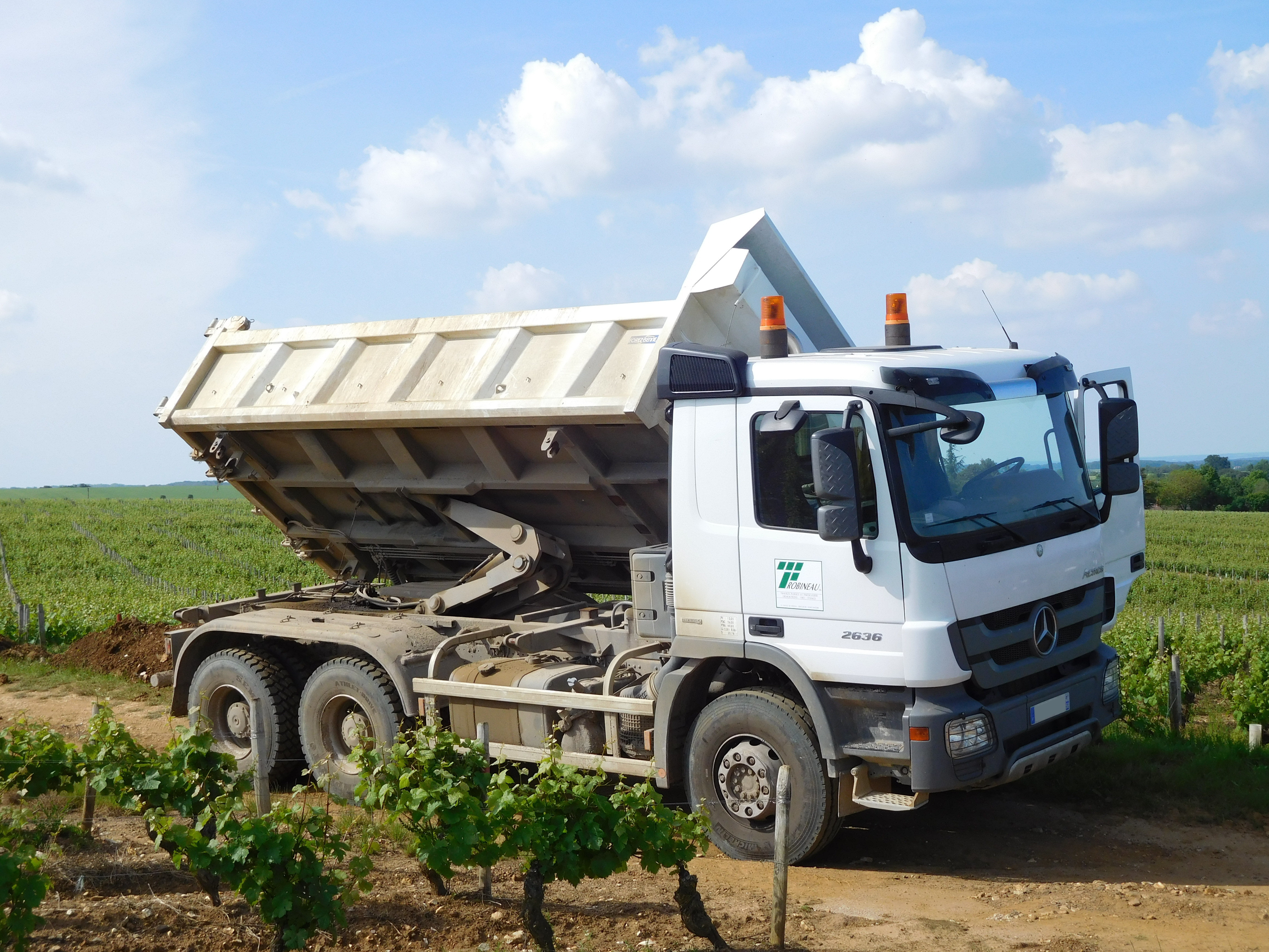 Camion benne Mercedes-Benz Actros 2636 ; déchargement latéral de la benne basculante (inclinée vers la gauche) remplie de terre. Dans un vignoble près de Sainte-Gemme-en-Sancerrois (Cher, Centre-Val de Loire, France).